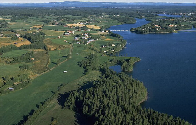 Bron mot Dvärsätt. Motiv: Krokom Nyckelord: Flygbilder, Riksintressen Kategori: Miljöer, Odlingslandskap Bron mot Dvärsätt.